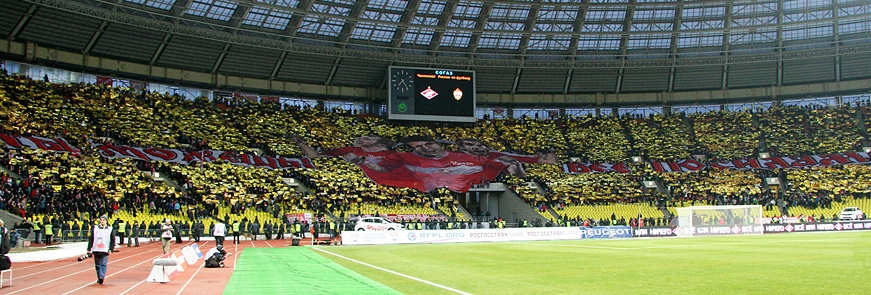 Перфоманс "Все ты можешь, все по силам" в игре против ЦСКА. 2012 год